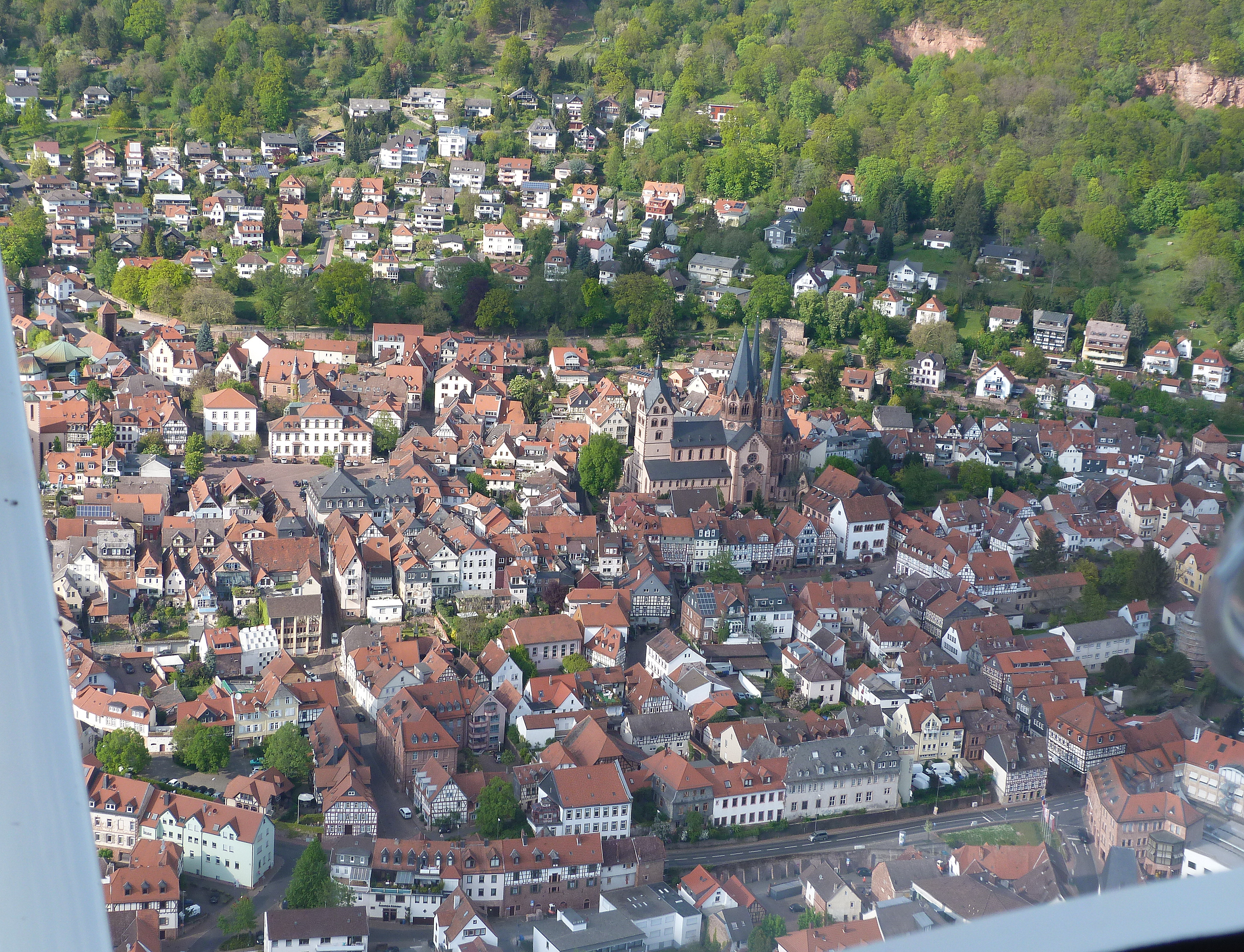 Gelnhausen aus dem Flugzeug aufgenommen